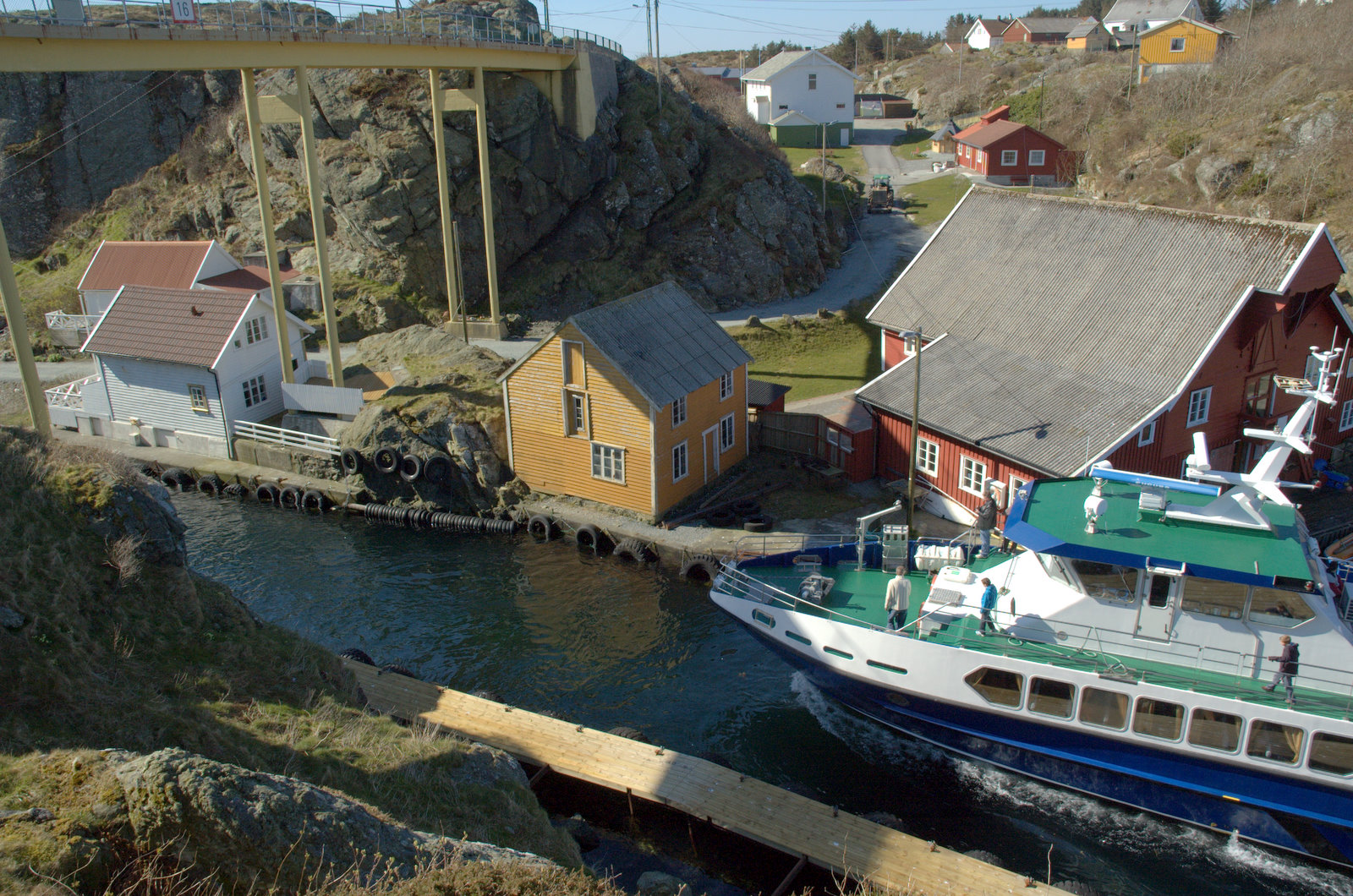 Øysamfunnet Røvær består av en rekke øyer. To er bebodd, Røvær og Urd, og de er forbundet med bro over kanalen. Rutebåten har to seilingsleder den kan følge, kanalen leder mot søre utløp. Inn i bildet kan en se Røvær bedehuskapell og Røvær skole.